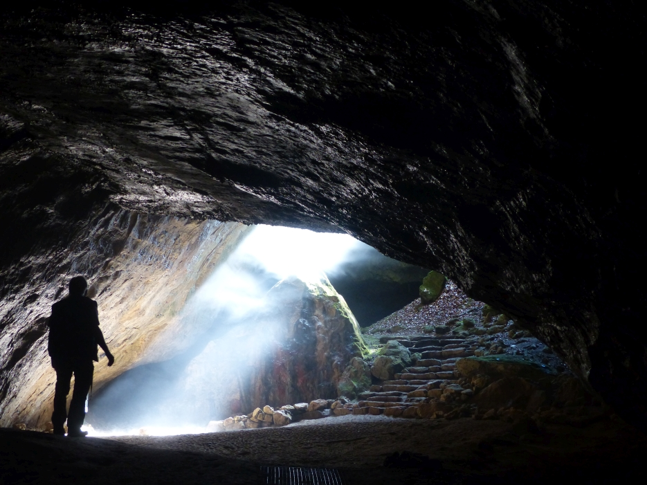 Die Einhornhöhle: Sonnenstrahl und Nebel in der Blauen Grotte